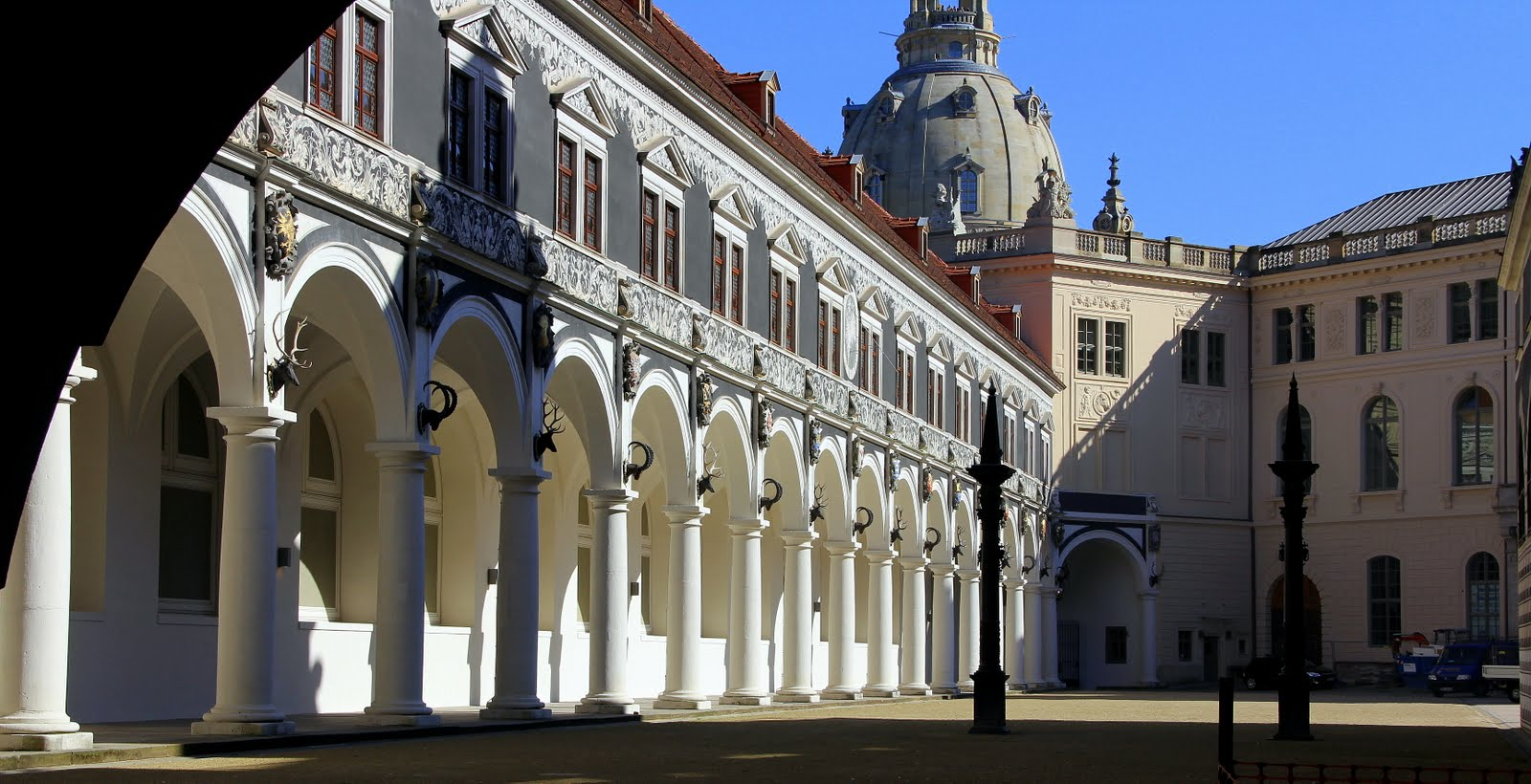 Drezda, Schloss